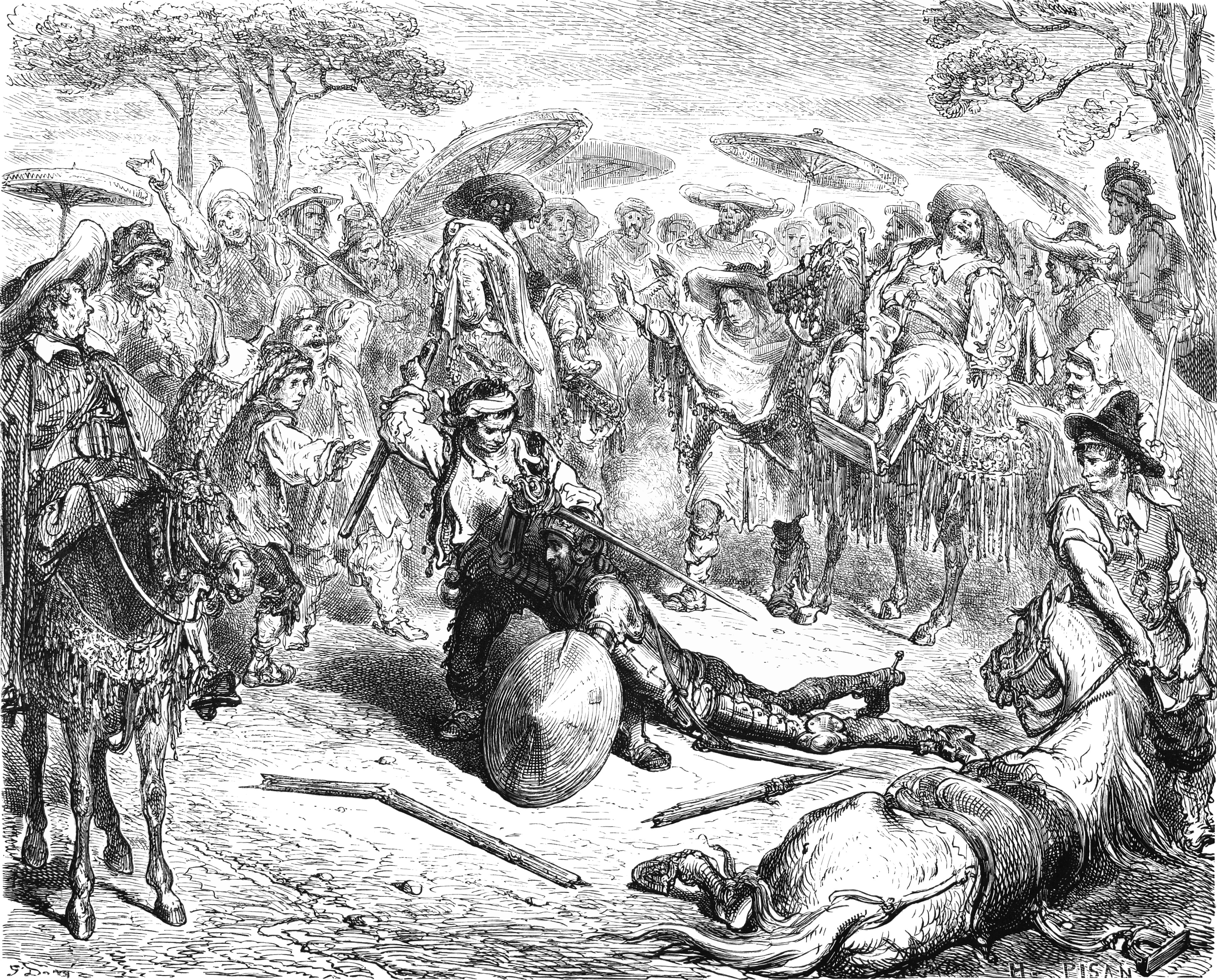 "Dom Quixote é sovado pelo criado dos mercadores", iIustração por Gustave Doré para “Don Quixote“ de Miguel de Cervantes.